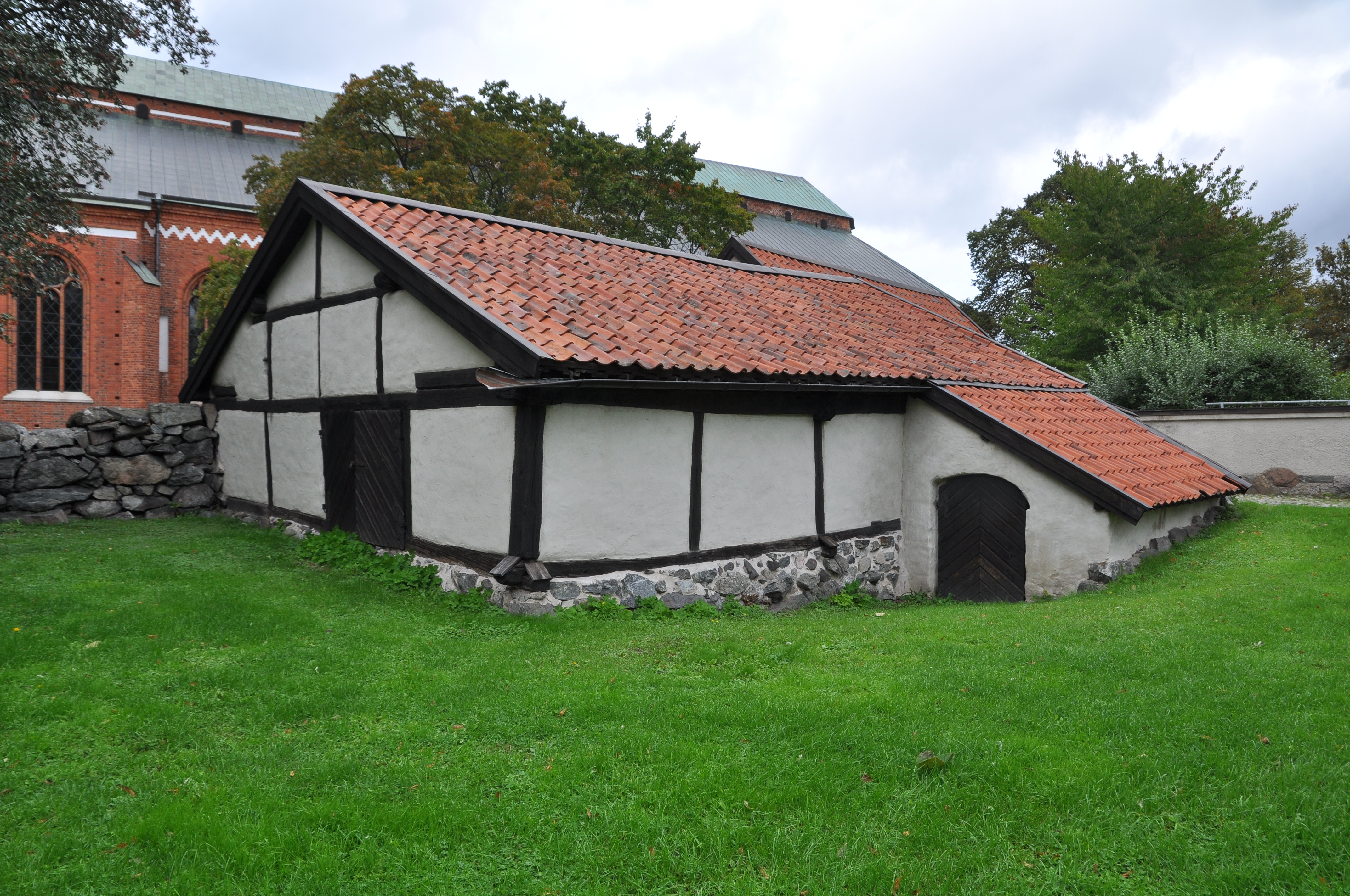 Västerås. Proban sedd från söder. I bakgrunden Domkyrkan.